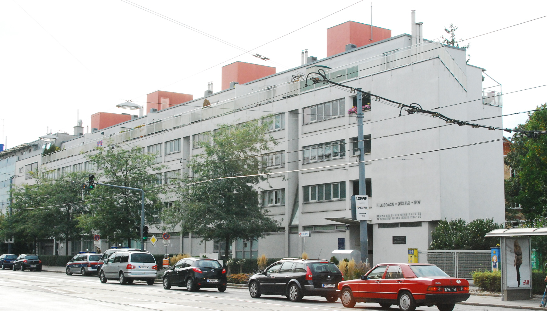 Hildegard-Burjan-Hof in Wien-Hietzing